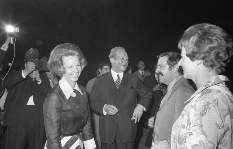 Sommerfest des Bundeskanzlers im Park des Palais Schaumburg